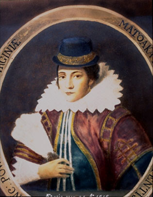 detail